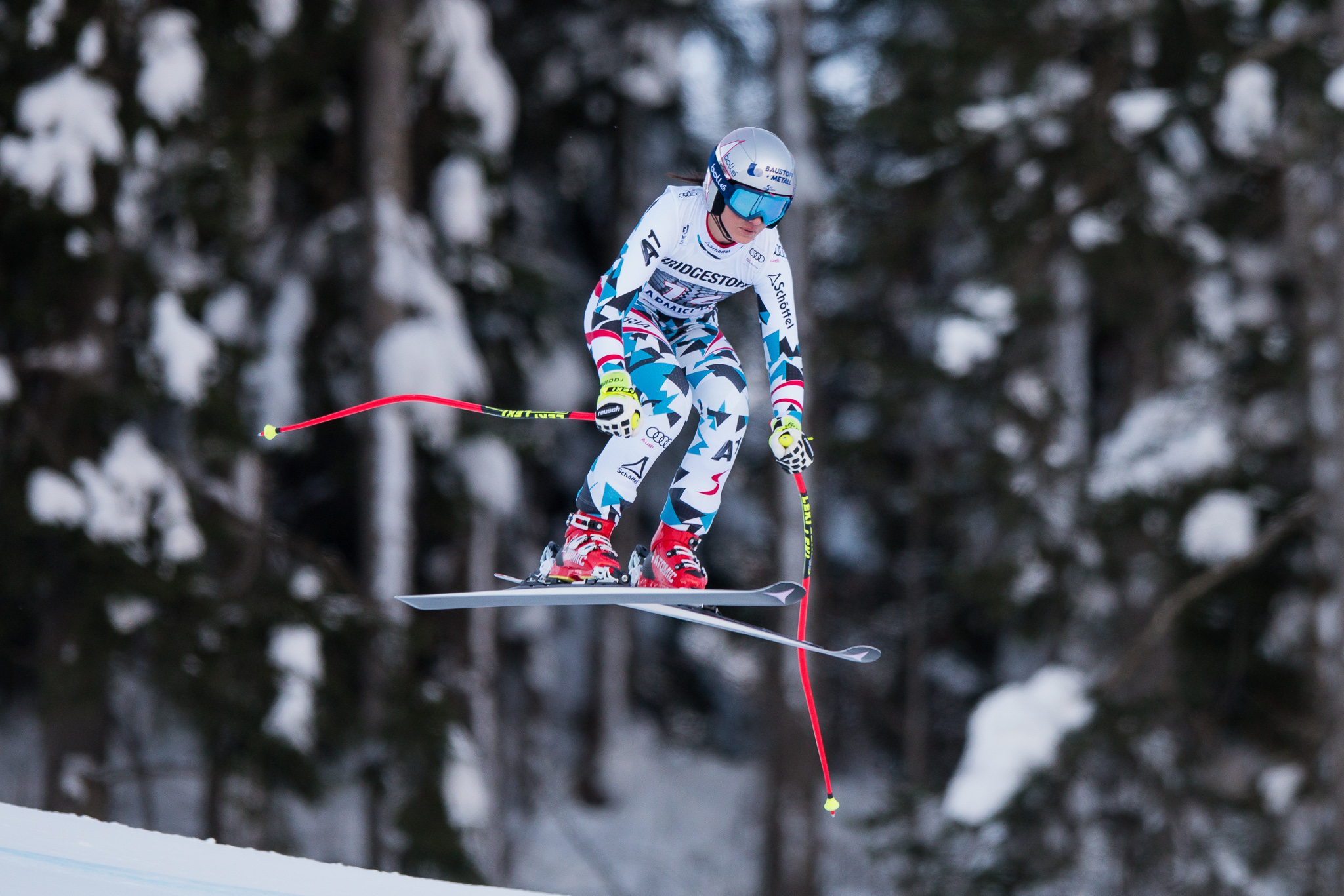 64. Kandahar Rennen,Audi FIS Ski Weltcup Garmisch-Partenkirchen,Damen Abfahrt,Kandahar,Ladies Downhill,Stephanie Venier